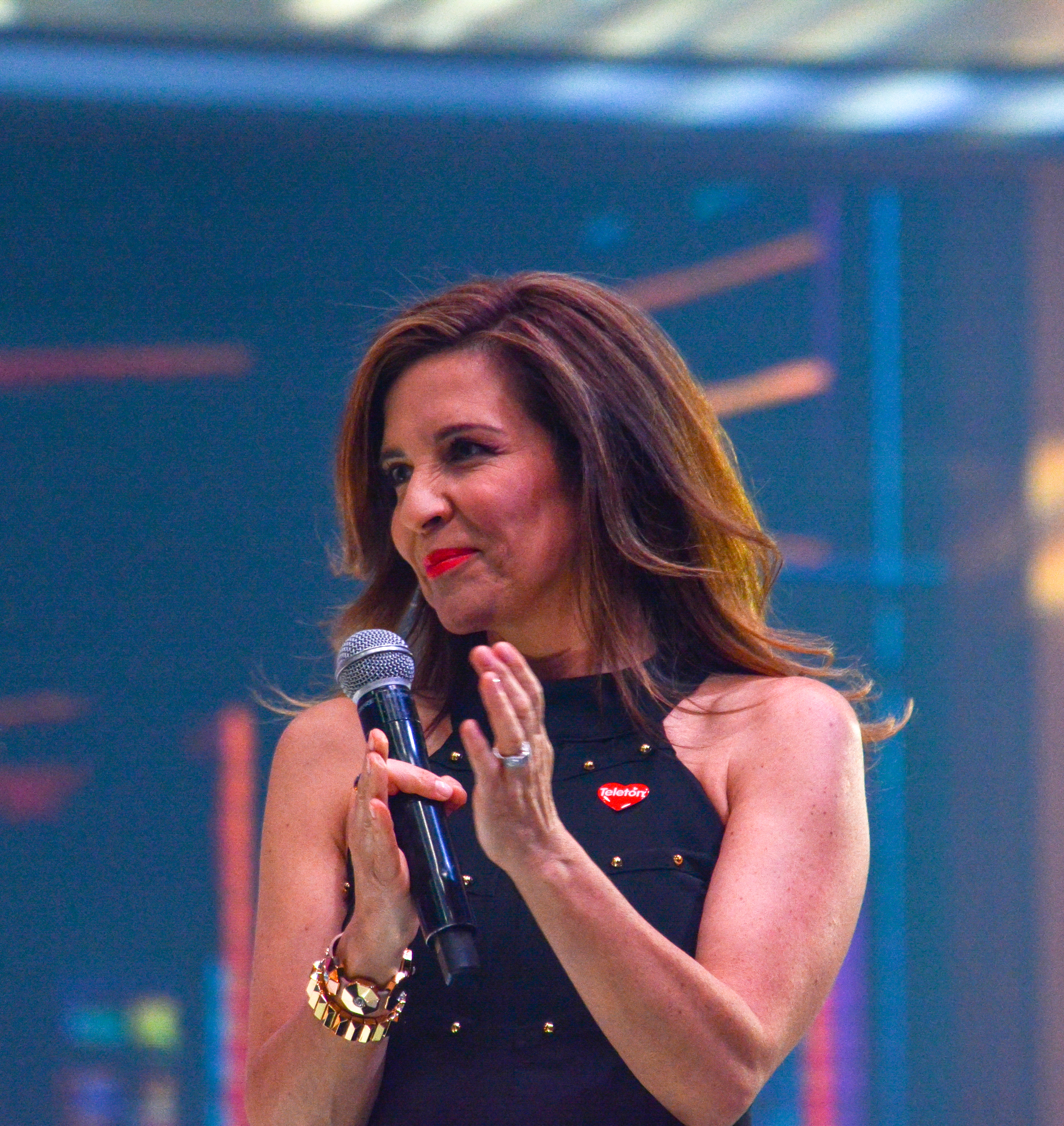 Teletón 2017